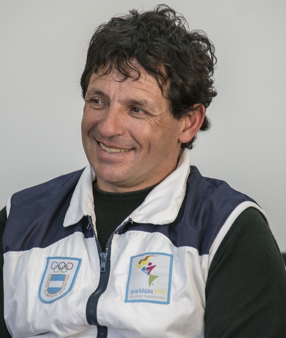 Juan Curuchet FPV